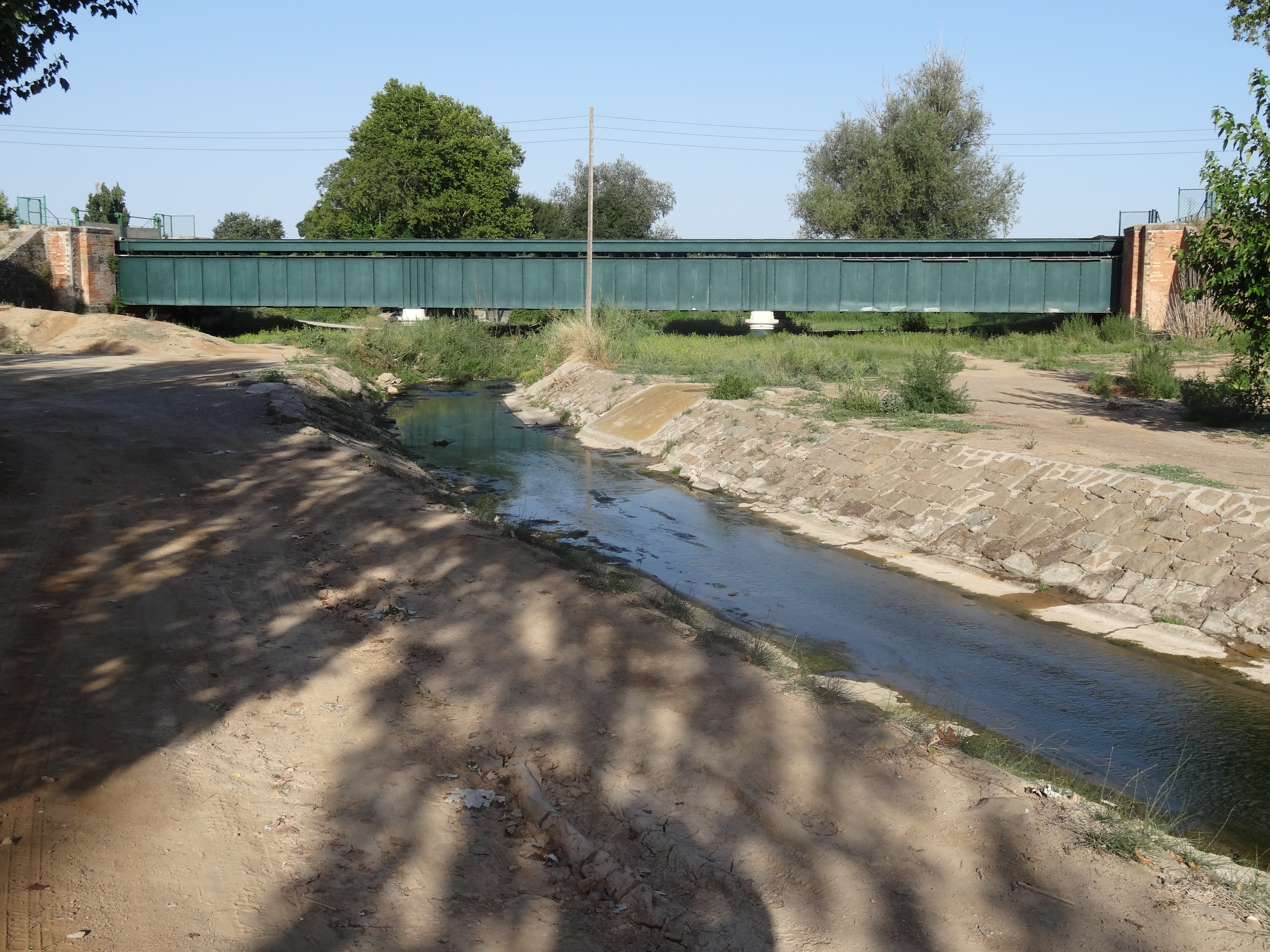 Pont de Ferro d'Agramunt, aqüeducte que transporta les aigües del Canal d'Urgell per damunt del riu Sió.